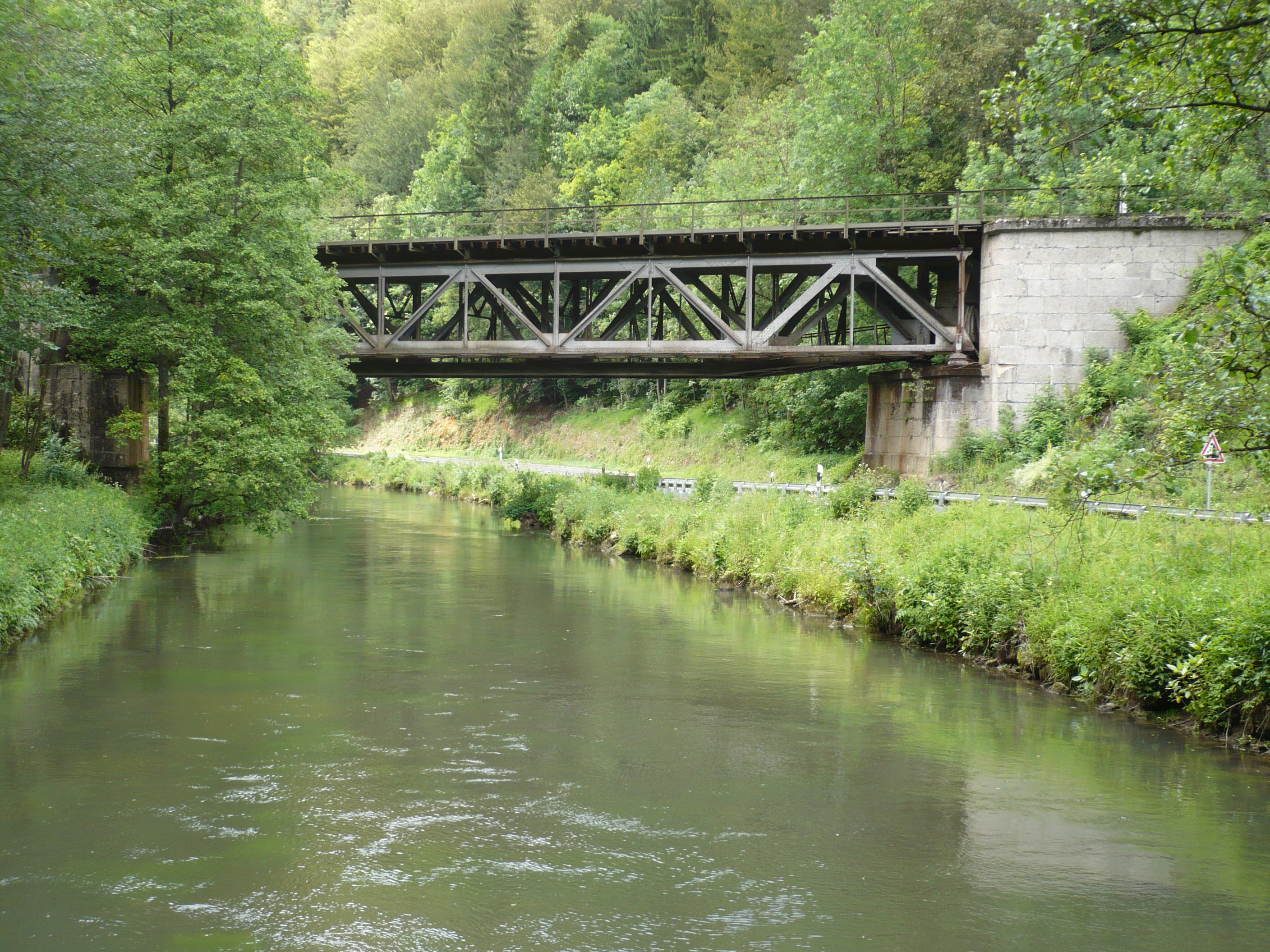 Eisenbahnbrücke im Pegnitztal